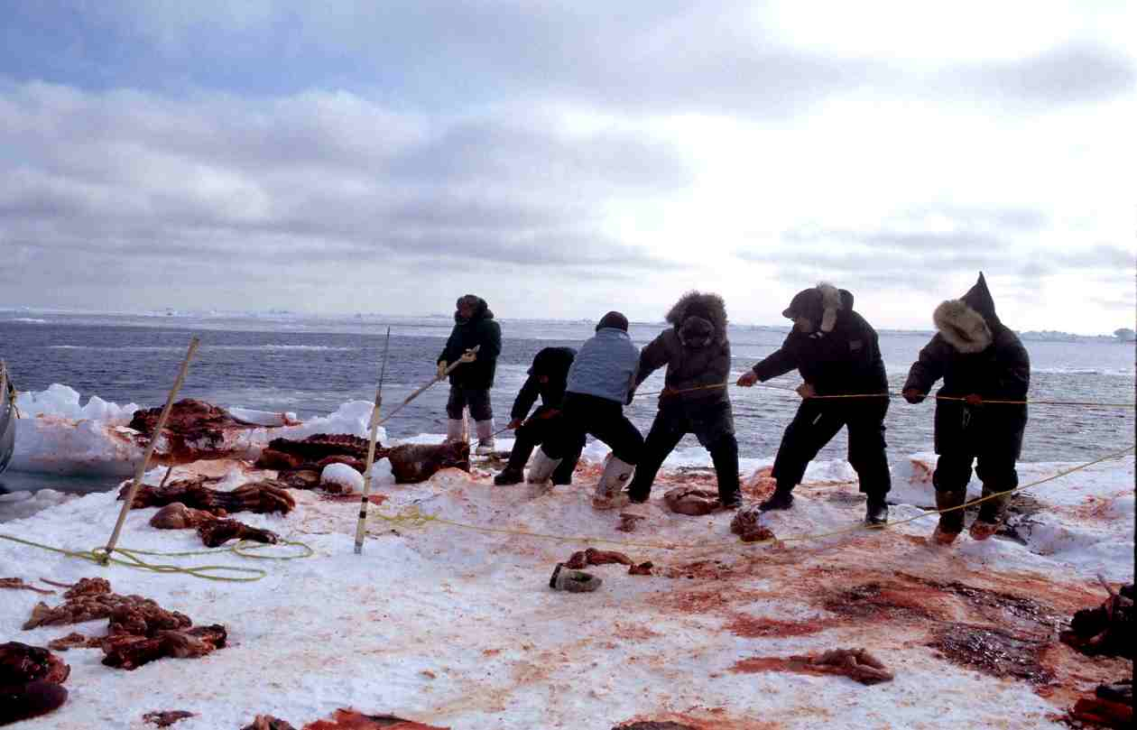 Walrus hunting in Sikusilak region, Hudson Strait, Nunavut, Canada